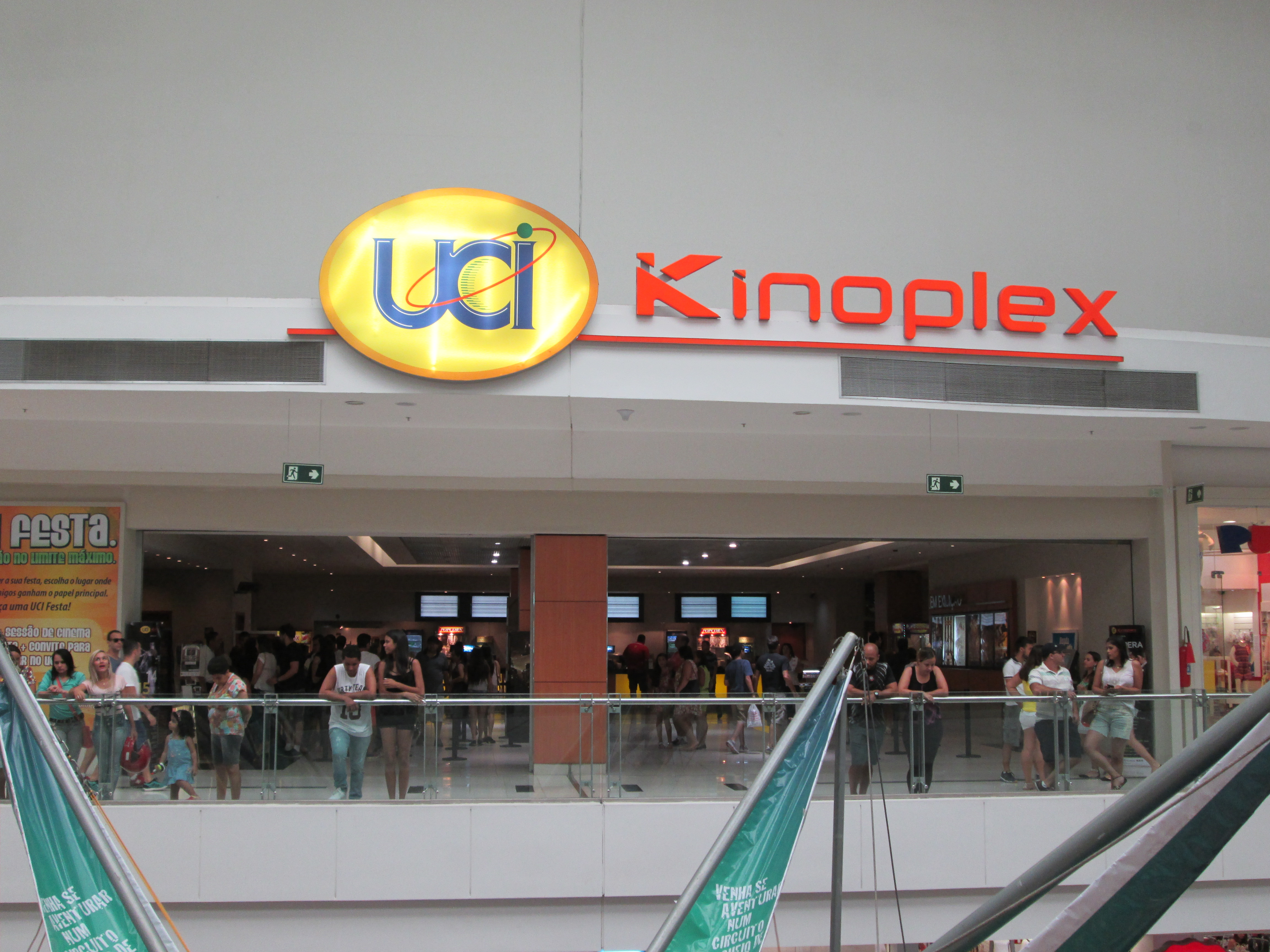 Cinema Kinoplex do Shopping Independência, Juiz de Fora, Minas Gerais, Brasil.